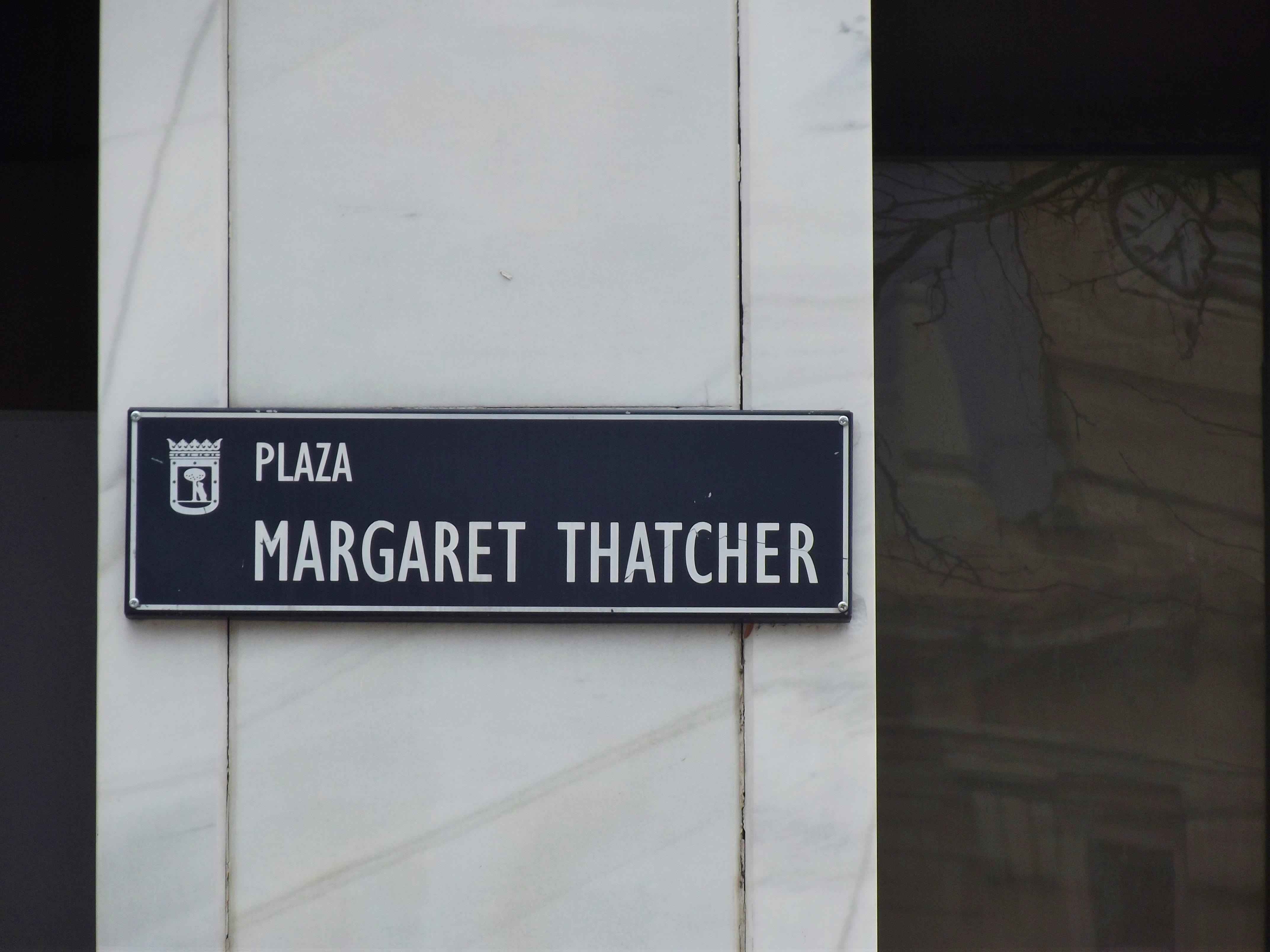 Rótulo de la plaza de Margaret Thatcher.